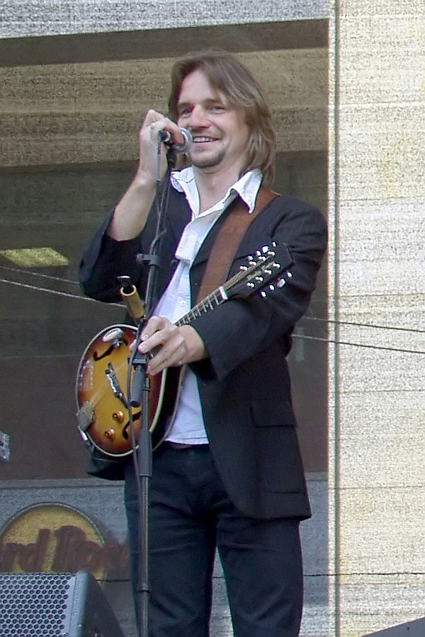 Jens Streifling (Gitarre, Mandoline, Saxophon), Mitglied der Band „Höhner“ auf der politischen Demonstration „Köln stellt sich quer“ gegen den so genannten „Anti-Islamisierungskongress“ der rechtsgerichteten Partei „Pro Köln“ vor dem Gürzenich in Köln.